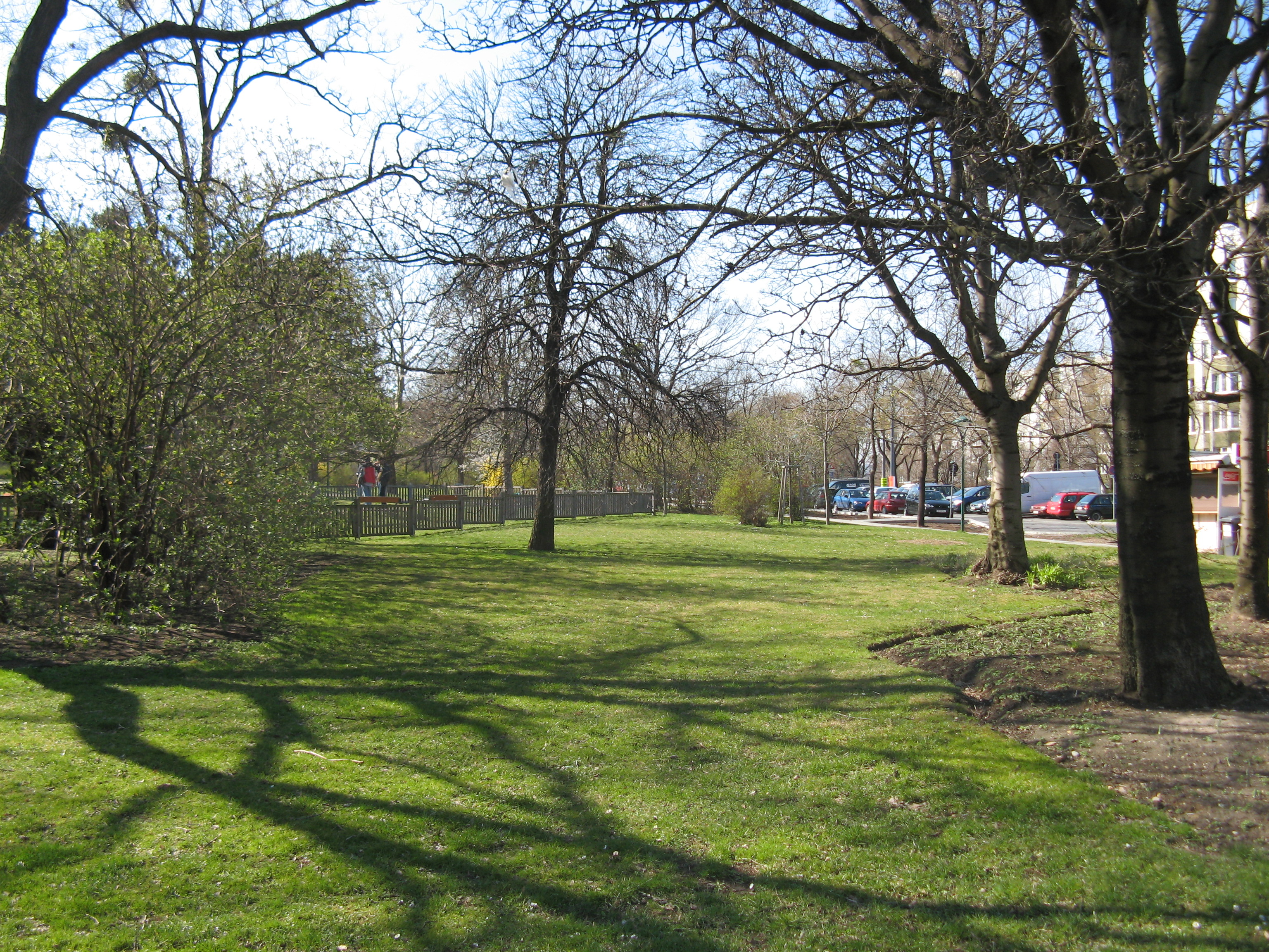 Martin Luther King-Park, Wien-Favoriten